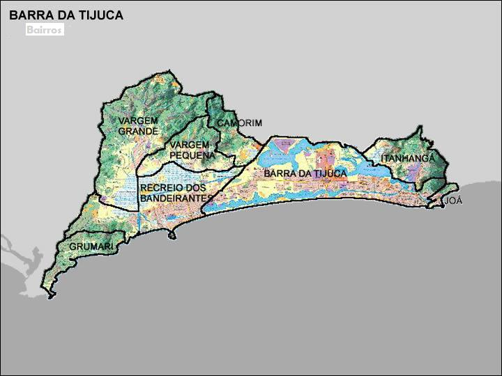 Bairros da XXXIV Região Administrativa (Barra da Tijuca)